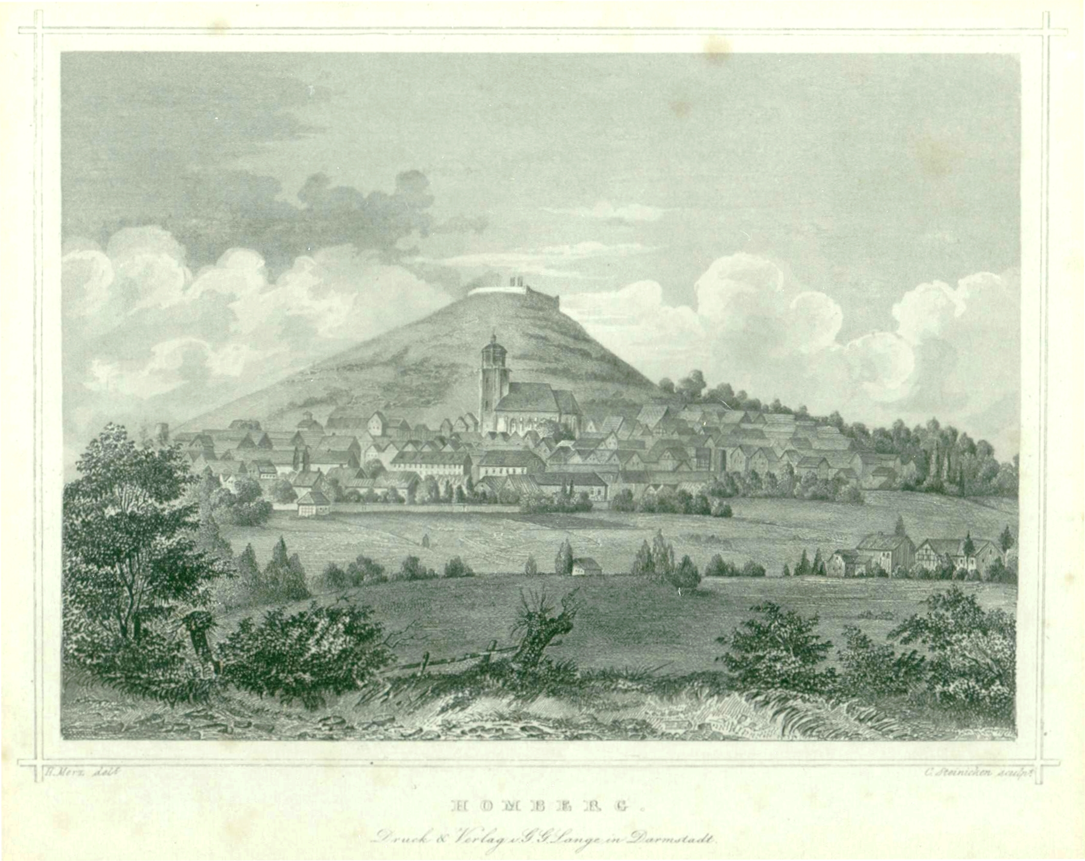 Homberg, Efze. Ansicht: die Stadt Homberg mit Burg Hohenburg.